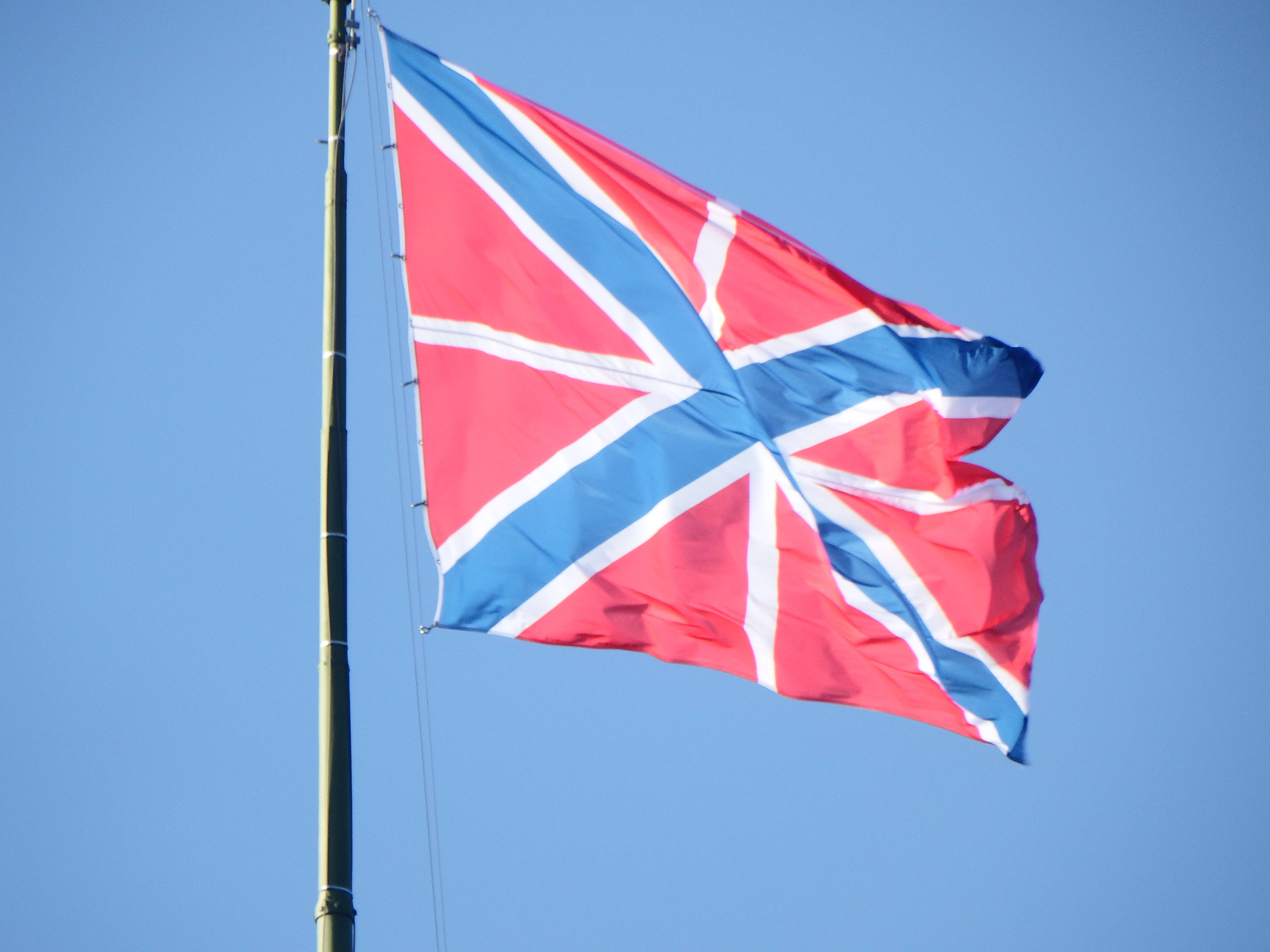 Крепостной флаг над Выборгским замком